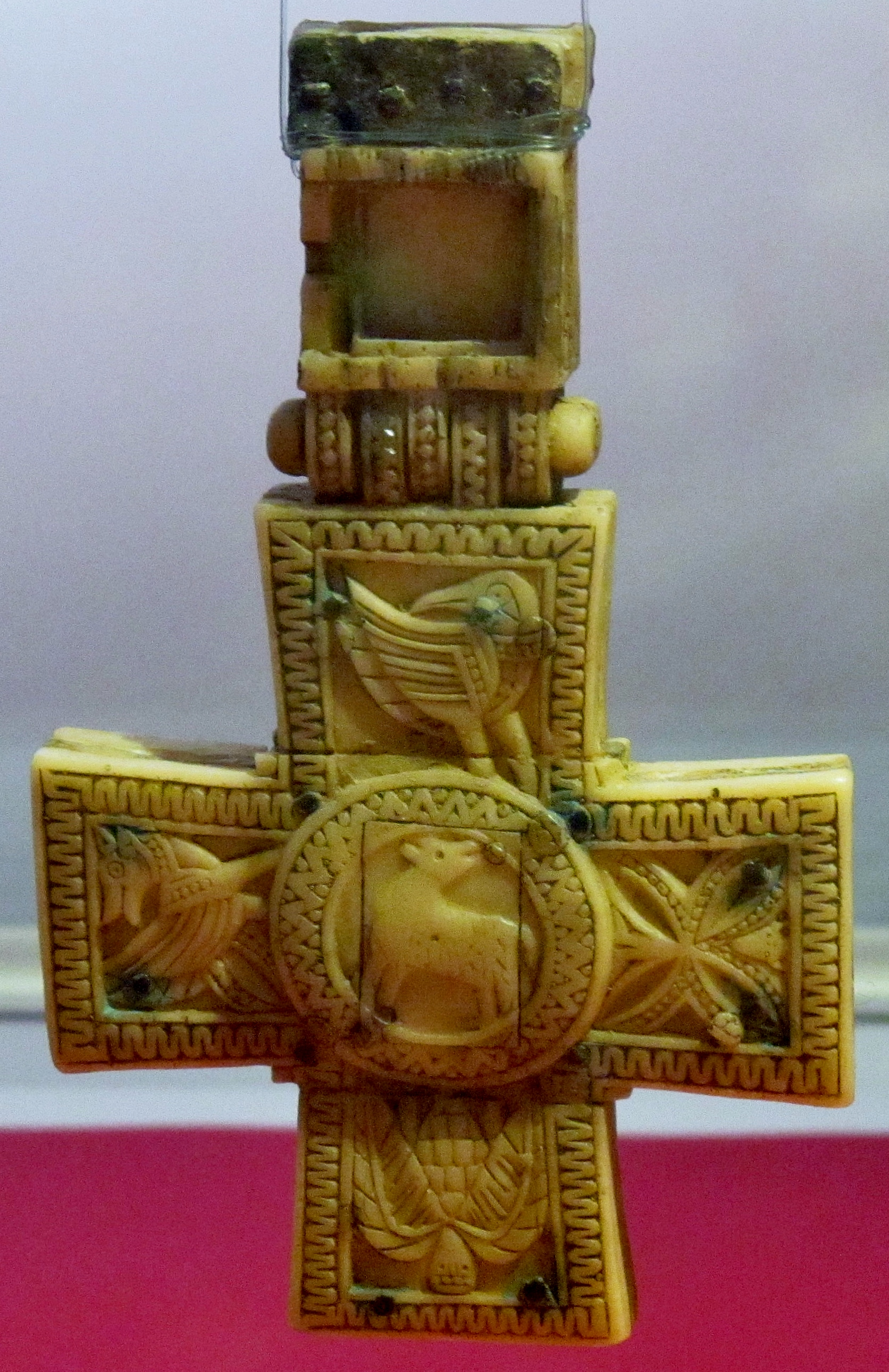 Croix d'ivoire dite "Croix pectorale des abbés de Saint-Mathieu" datant du 8e siècle et conservée dans l'église Saint-Pierre-et-saint-Paul de Milizac (facsimilé exposé au musée de l'abbaye de Landévennec lors de l'exposition temporaire "La Bretagne au temps des rois" en 2018). Elle pourrait provenir du Proche-Orient (Egypte ? Syrie ? Ethiopie ?) ou être une copie fabriquée en Europe occidentale d'après un modèle proche-oriental.